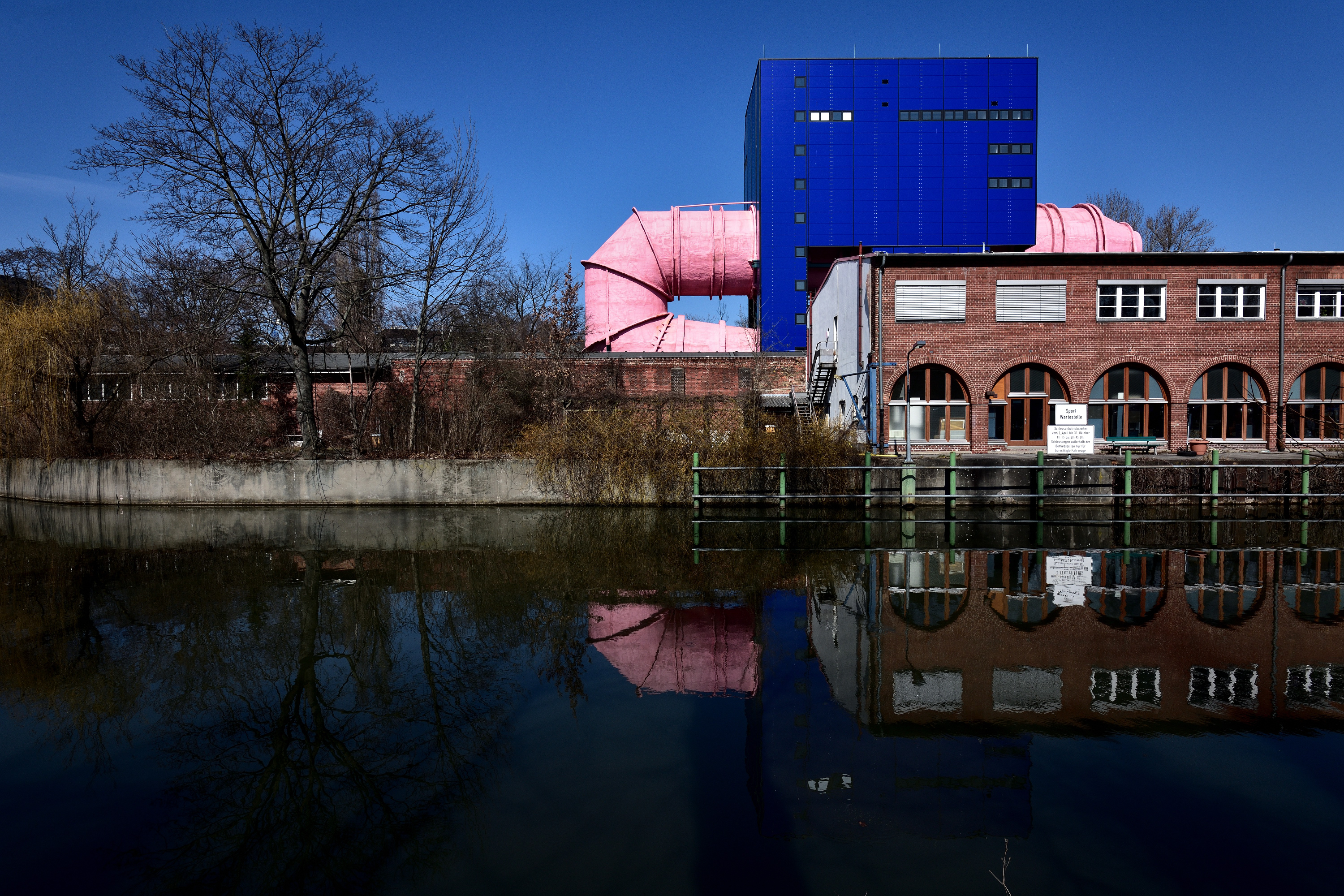 Umlaufkanal der Versuchsanstalt für Wasserbau und Schiffbau (VWS), Berlin. Erbaut 1968 - 1976. Architekt: Ludwig Leo.This is a photograph of an architectural monument.